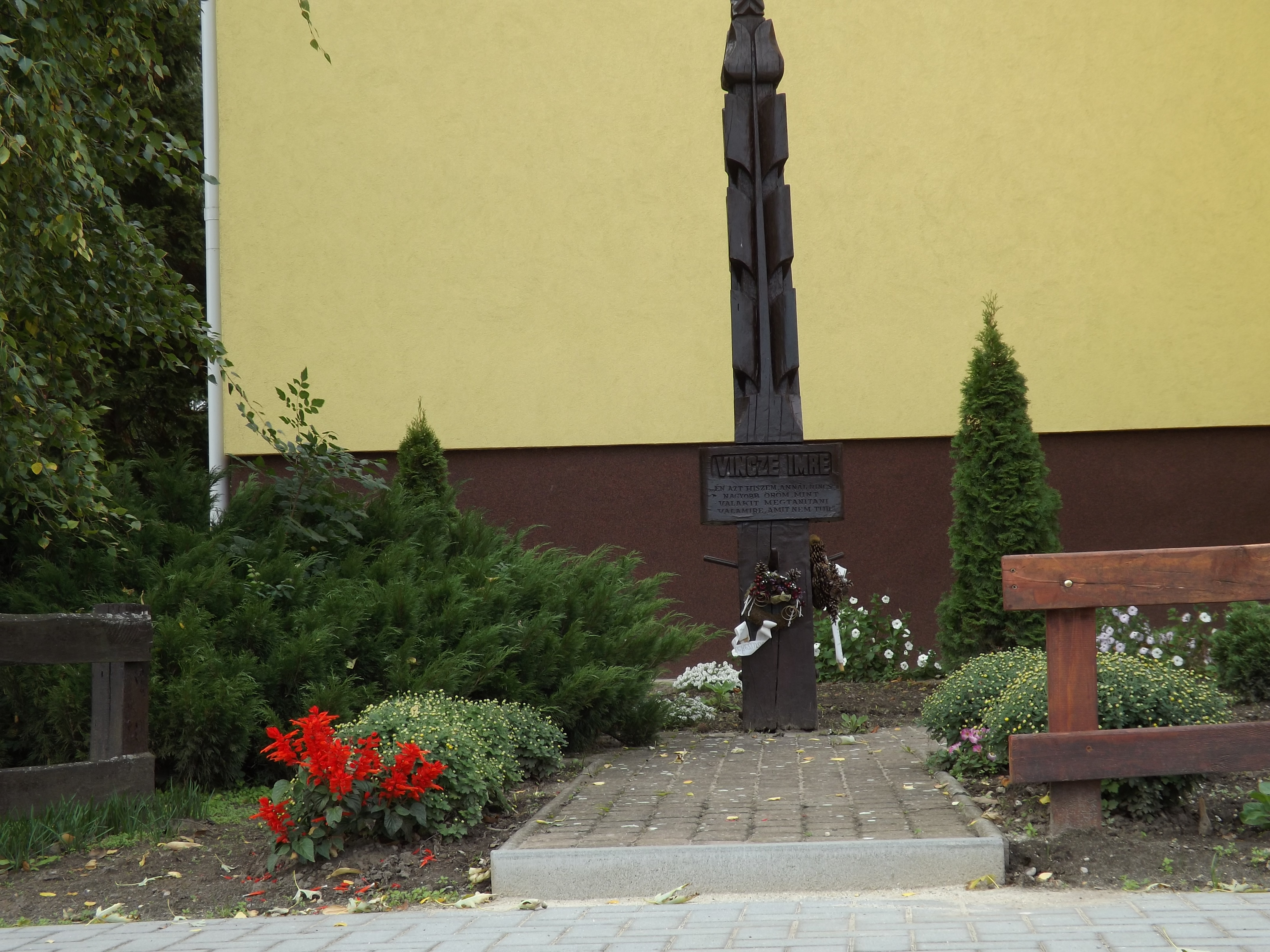 Kocs, Vincze Imre-emlékoszlop a róla elnevezett iskola előtt